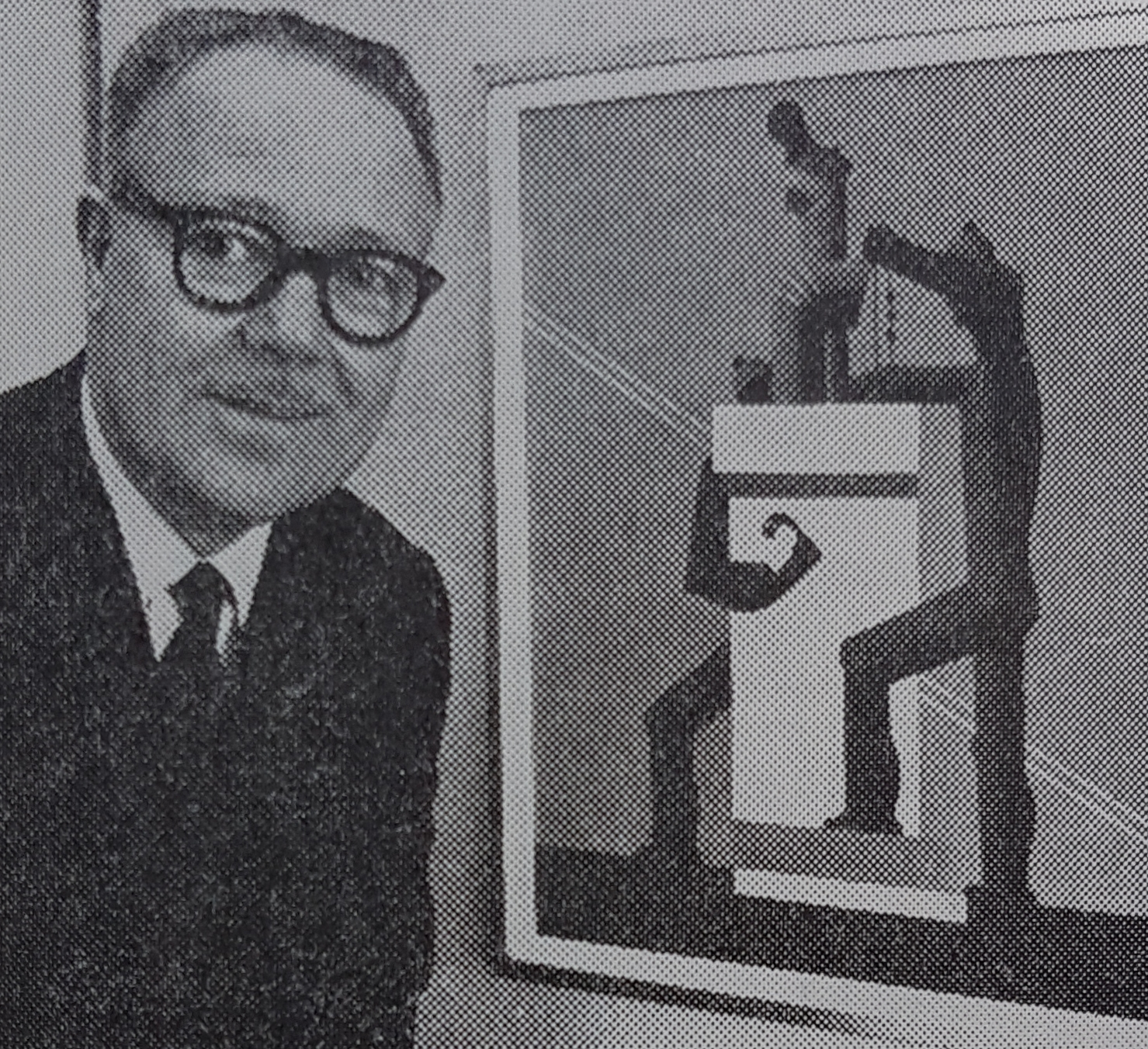 Esaias Thorén 1961 med en målning från 1929, avfotograferad porträttbild från Allhems Svenskt konstnärslexikon.